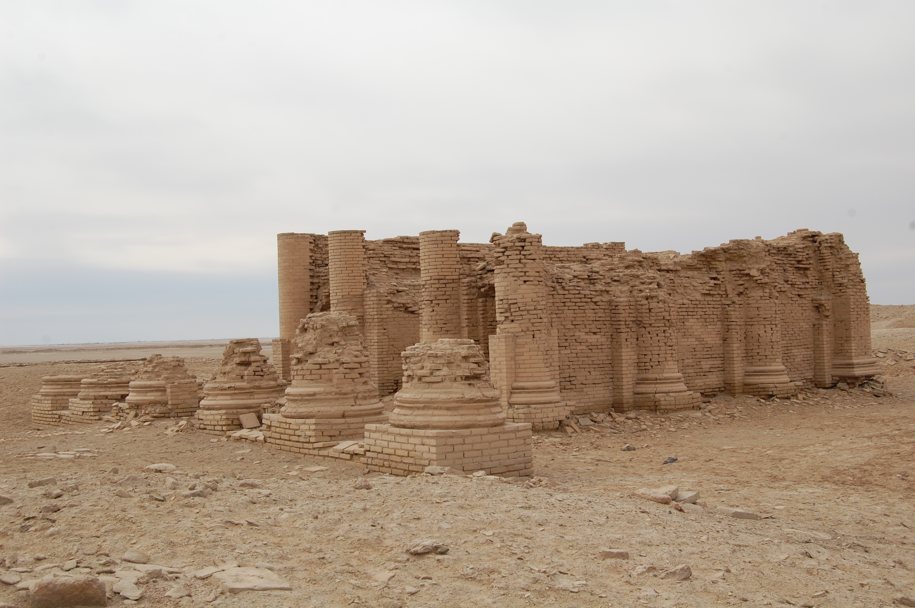 معبد كاريوس او آريوس من أهم معابد مدينة الوركاء الاثرية يعود للفترة السلوقية، ومدينة الوركاء أو أوروك بالسومرية أواوريتش باليونانية، هي مدينة سومرية وبابلية تقع على ضفاف نهر الفرات، وتبعد عن مدينة أور 35 ميل وتقع حوالي 30 كم شرق مدينة السماوة